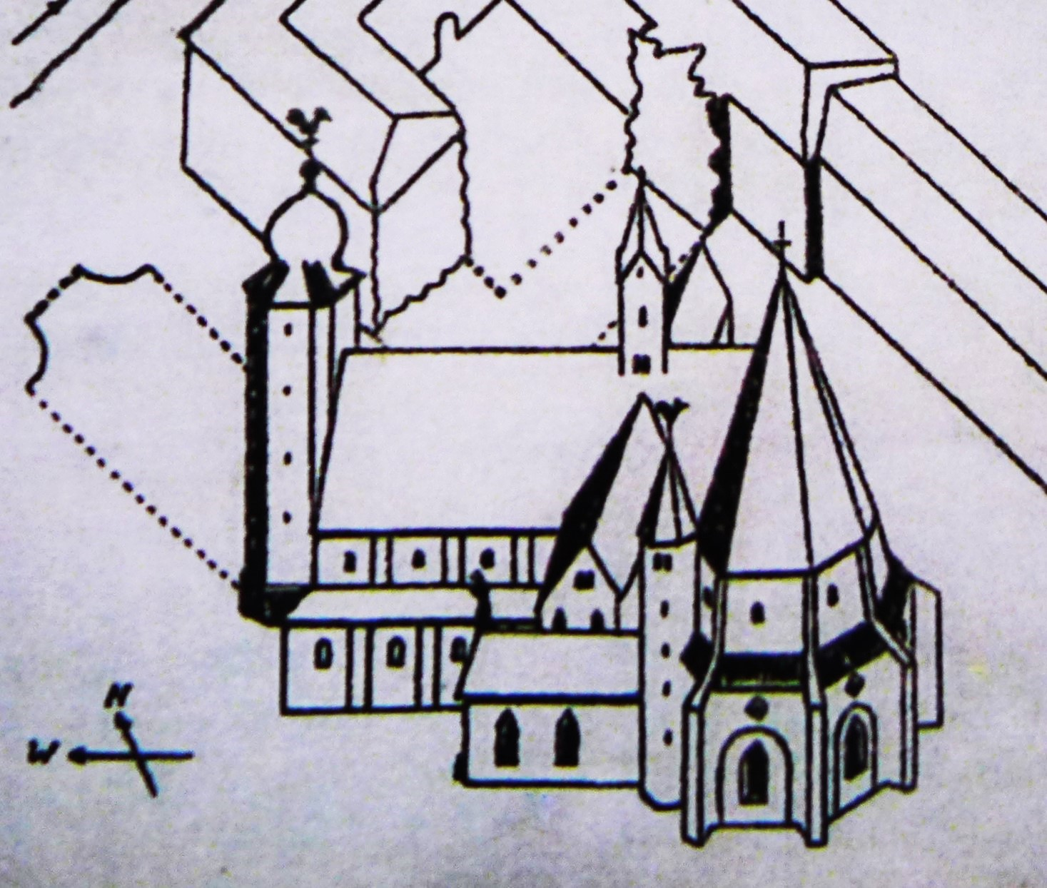 Abtei Mettlach, Rekonstruktion des möglichen Aussehens der Abteikirche mit dem Alten Turm im 18. Jahrhundert, die punktierten Linien vor dem Kirchturm zeigen die projektierte Barockkirche (Rekonstruktion Karl Conrath nach einer topographischen Karte von 1807)